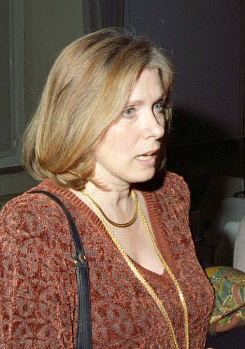 Angiola Baggi